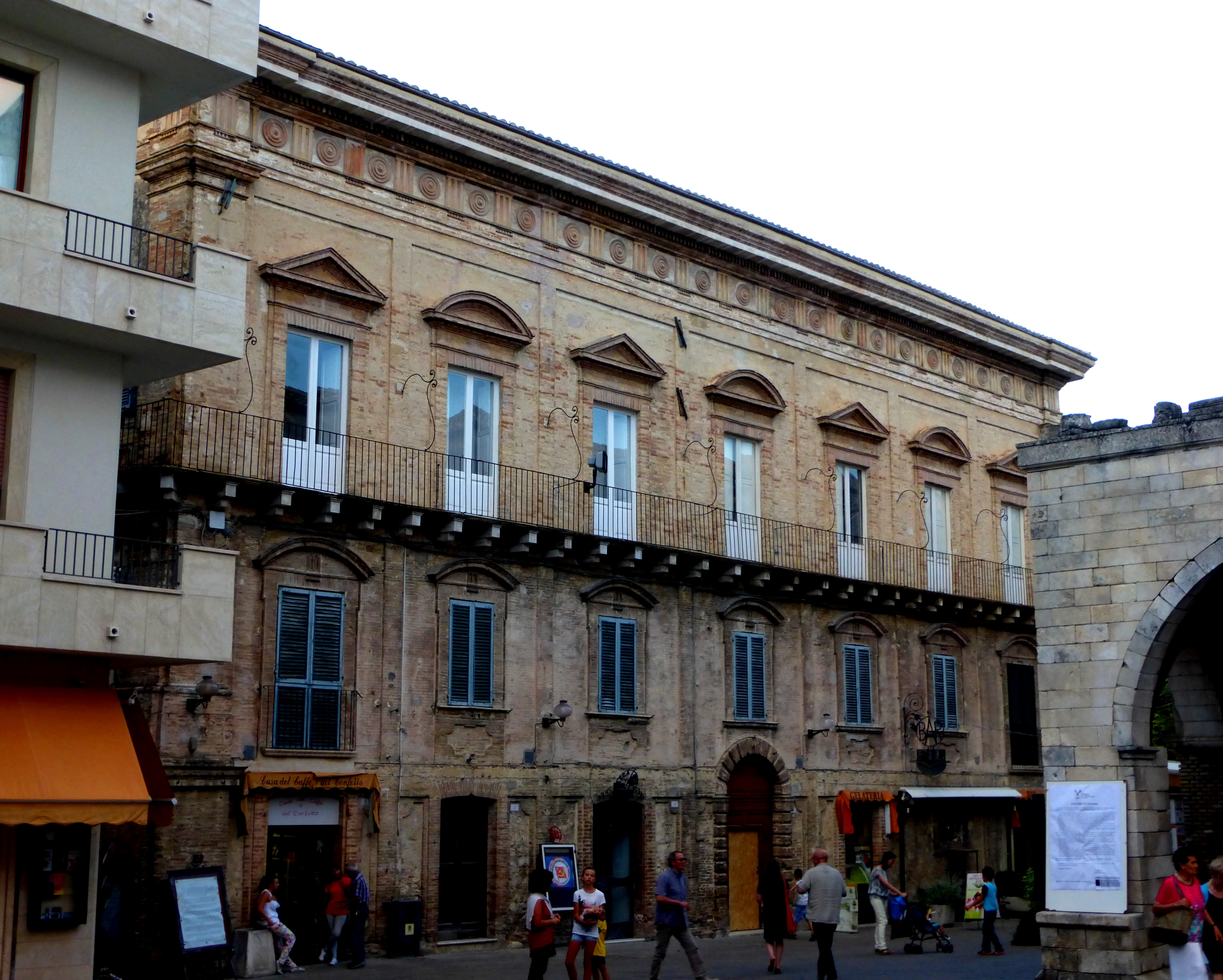 Palazzo Vitacolonna, Guardiagrele, Chieti.